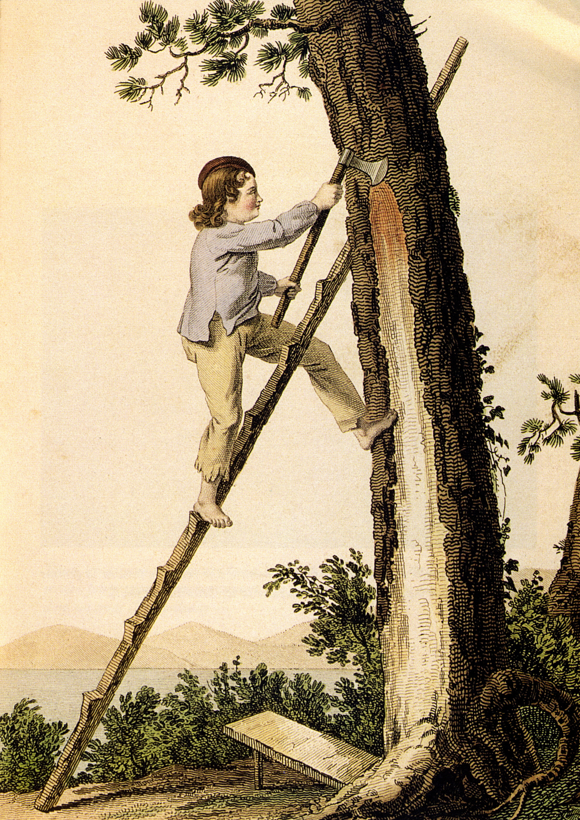 Gravure de Gustave de Galard, illustrant le gemmage au crot en 1818 à la Teste de Buch (Gironde, Aquitaine, France)